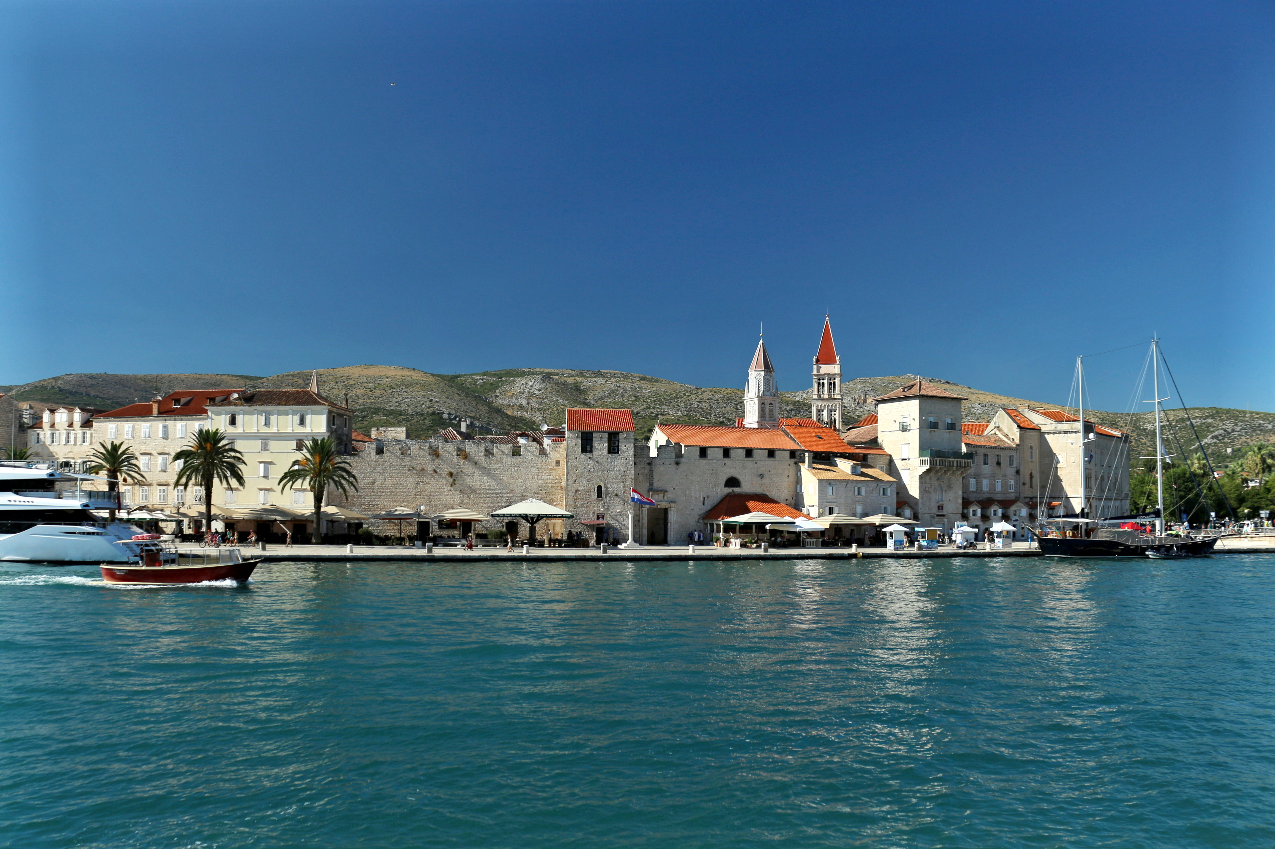 Trogir, Splitsko-dalmatská župa, Chorvatsko